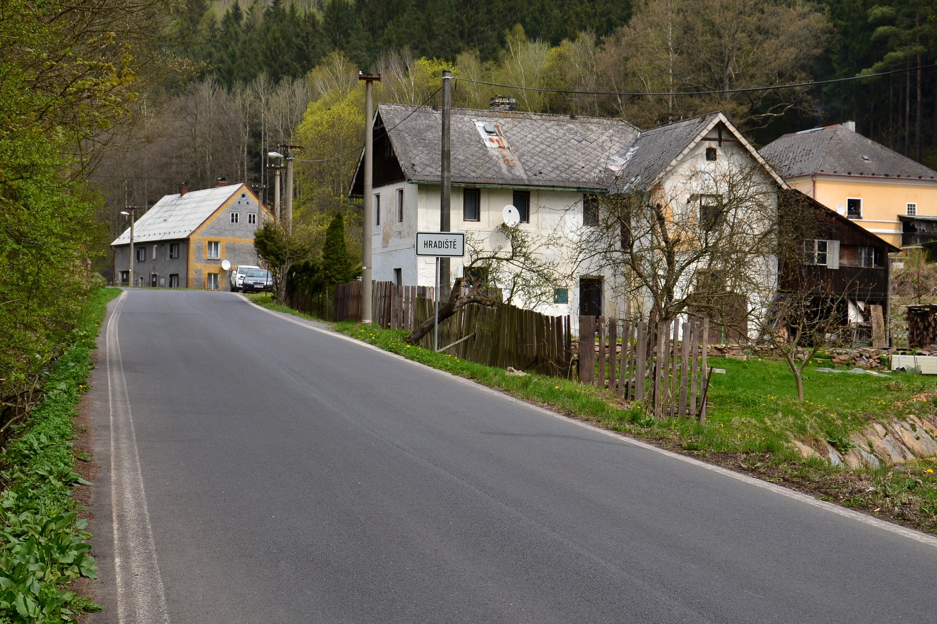 Hradiště - jižní vjezd do vesnice